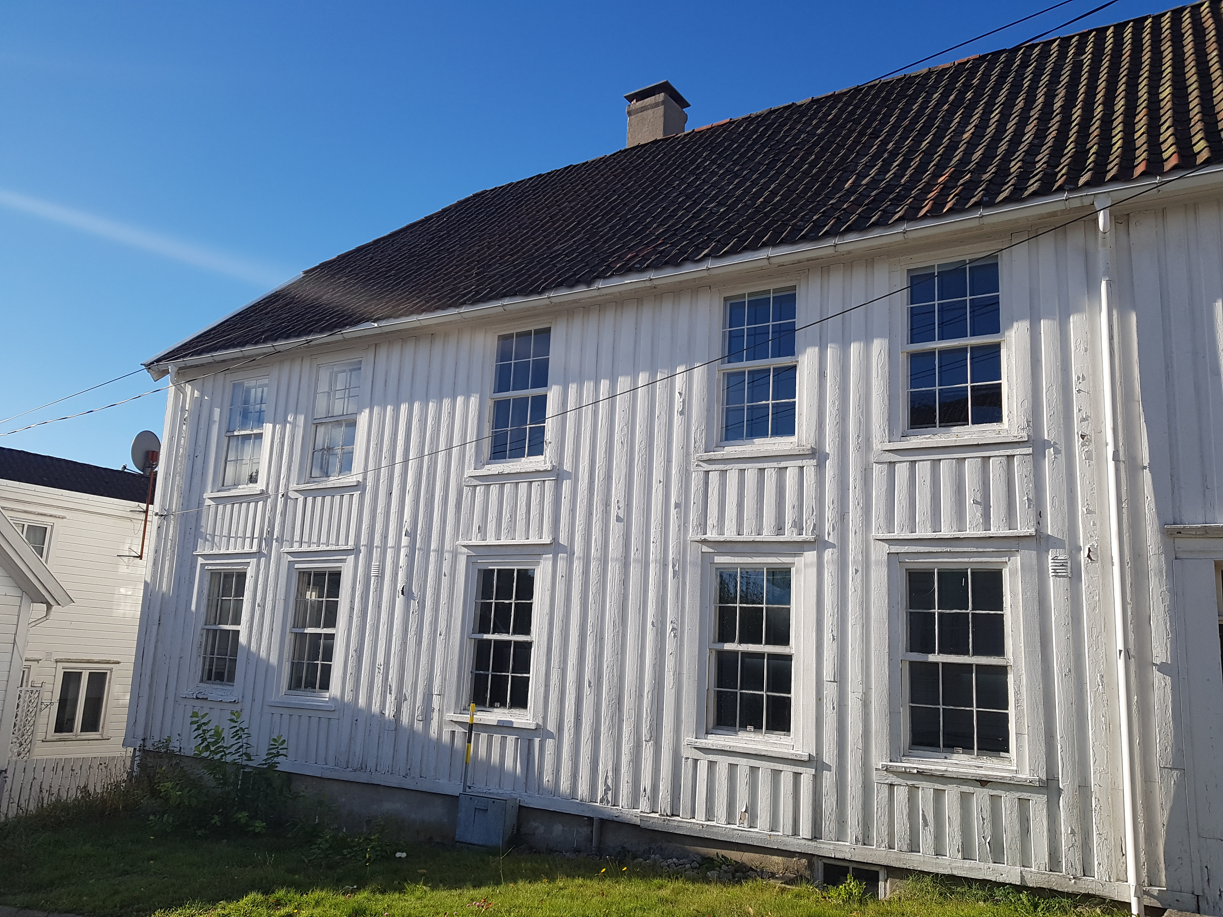 Delen av Tingsalen som ble oppført av Christian Grøgaard. Resten av bygget (synlig til høyre) ble påbygd siden. Foto tatt høsten 2018.